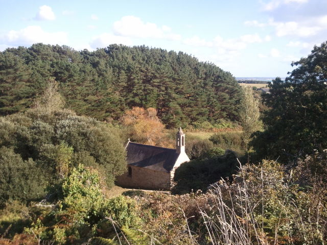 Plouhinec. Chapelle Saint-They (vue générale)